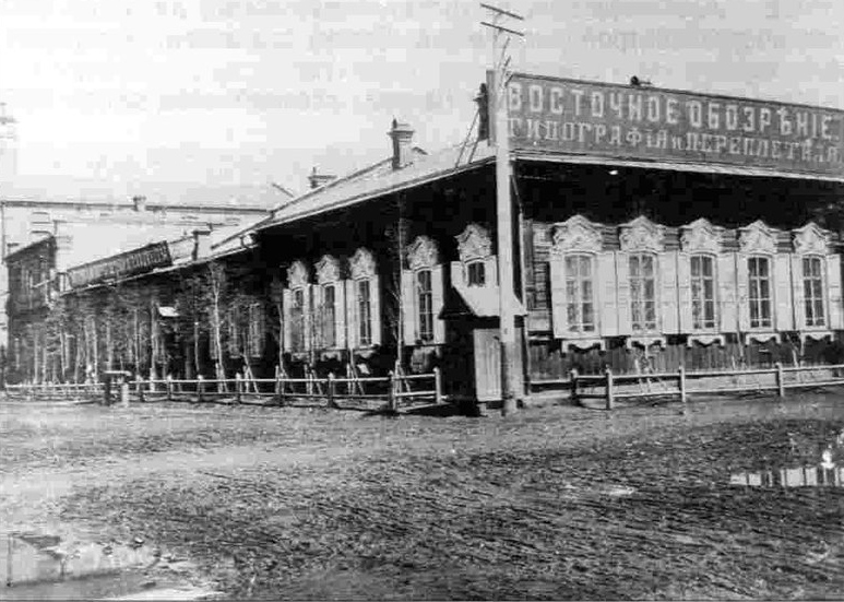 Здание типографии и редакции газеты "Восточное обозрение" (Иркутск, до 1906)